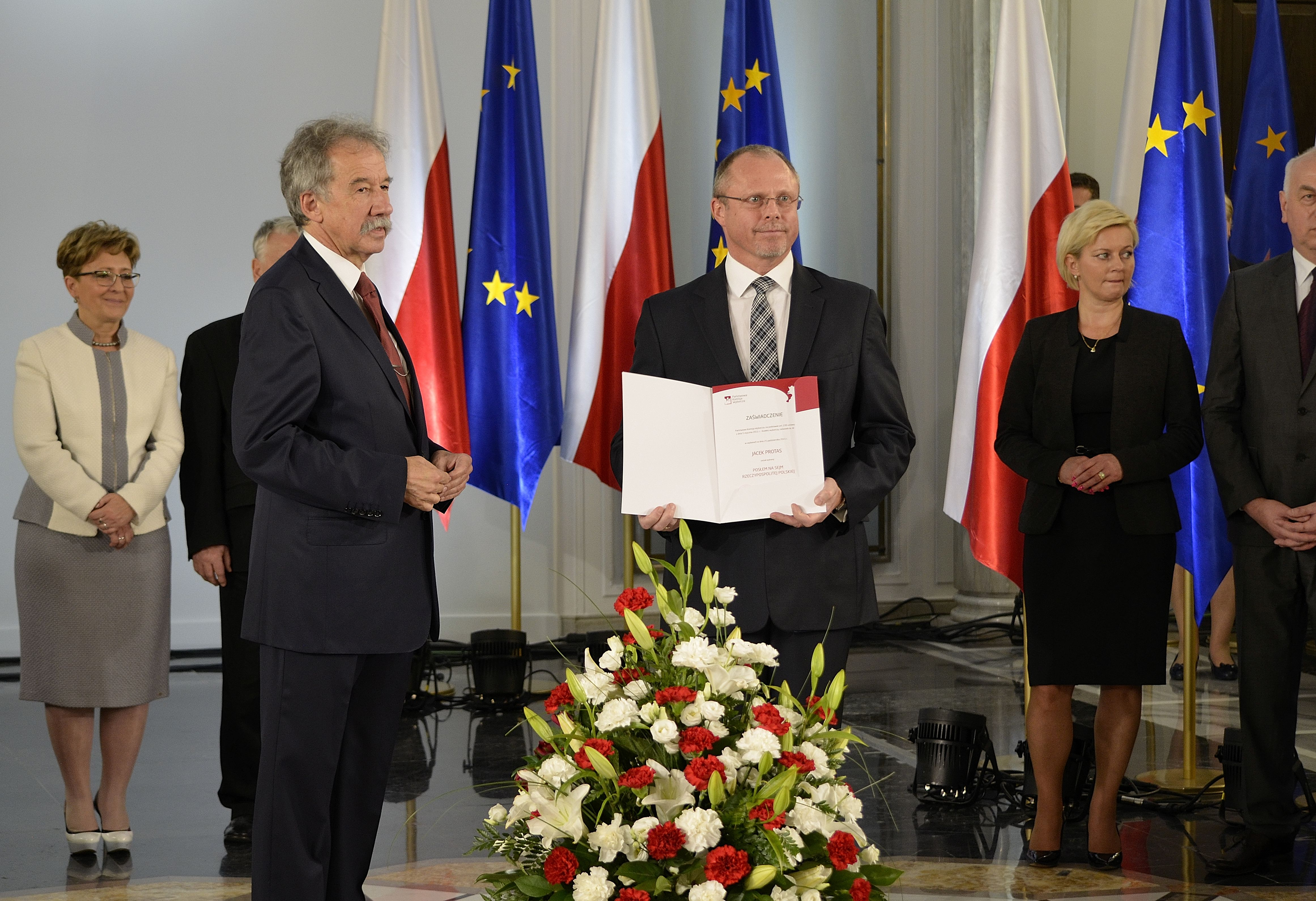 Poseł Jacek Protas podczas uroczystości wręczenia zaświadczeń o wyborze nowo wybranym posłom w Sali Kolumnowej Sejmu